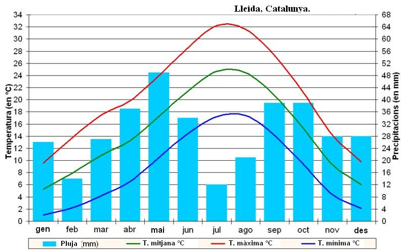 Dades estadístiques climatològiques (període 1971-2000).